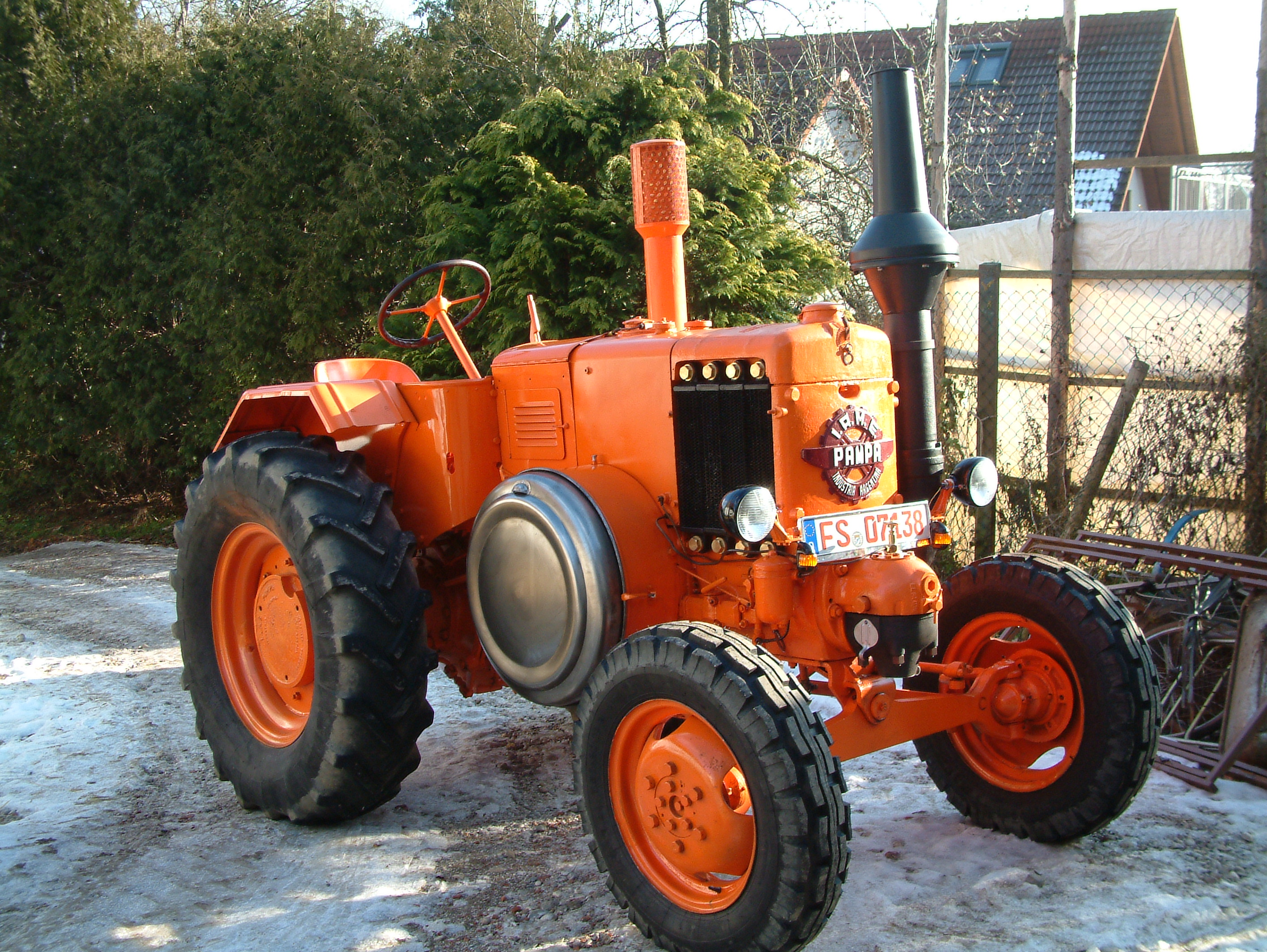 Restaurierter I.A.M.E. Pampa T01 Glühkopfbulldog, Baujahr 1952